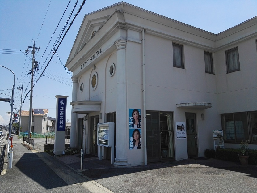 Happy Science in Kariya